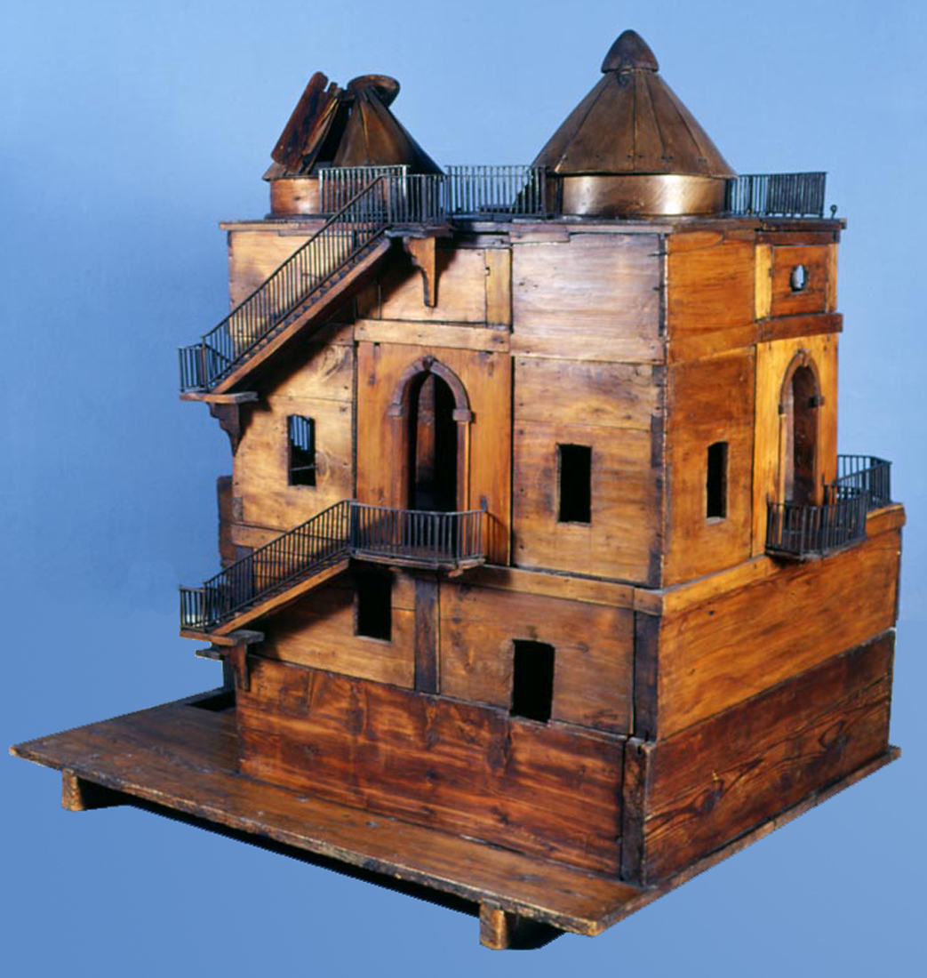 Si tratta quasi certamente del modello originale in legno fatto costruire da Ruggero Giuseppe Boscovich (1711-1787) per illustrare al rettore del Collegio dei Gesuiti di Brera il suo progetto per il costituendo Osservatorio Astronomico. Il modello riproduce i due piani dell'Osservatorio con la terrazza e le due torrette. La lunga sala dei quadranti, che si trovava verso Est, è incompleta: mancano le pareti esterne e il tetto mentre è presente la parete che la separava dalla piccola stanza di ingresso Al piano inferiore sono presenti quattro stanze. Le due verso Nord sono prive di pavimento. Il pavimento delle due stanze rivolte verso Sud, invece, può essere sollevato e sotto uno di questi si può leggere la scritta "della Compagnia di Ges". Le quattro stanze hanno una finestra ciascuna così che vi sono due finestre verso Sud e due verso Nord Al piano superiore (secondo) si trova la sala ottagonale che costituiva il cuore vero e proprio della specola. Al suo interno si può vedere la colonna che regge il soffitto oltre alla balconata che porta agli ingressi delle due torrette. Verso Nord i muri esterni seguono la pianta quadrata del piano sottostante, mentre all'interno la sala ha una pianta ottagonale creata con muri interni. I finestroni della sala hanno ringhiere in ferro battuto. A Sud-Est e a Sud-Ovest i balconcini sono di forma triangolare Il soffitto della sala mostra quattro aperture con portelli per l'osservazione del cielo presso lo zenith. Le due torrette attraversano il soffitto e sono chiuse da tetti conici con aperture longitudinali coperte da uno sportello. Alcune scale esterne collegano i vari piani dell'edificio Gli incastri fra le varie parti sono realizzati in modo da poter smontare facilmente il modello per osservarne l'interno. Funzione Rappresentazione modellistica del primo progetto architettonico dell'Osservatorio Astronomico di Brera di Milano.